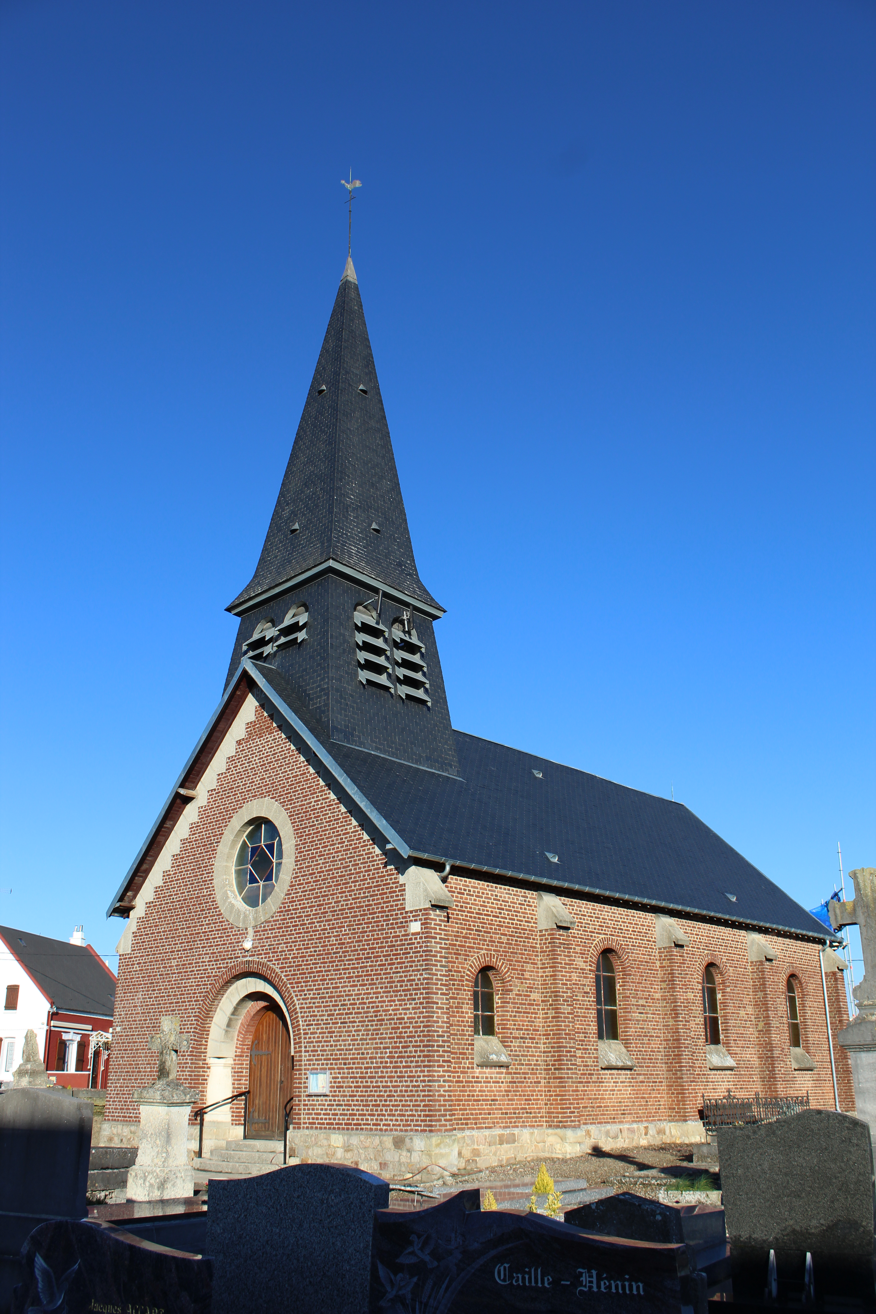 L'église.